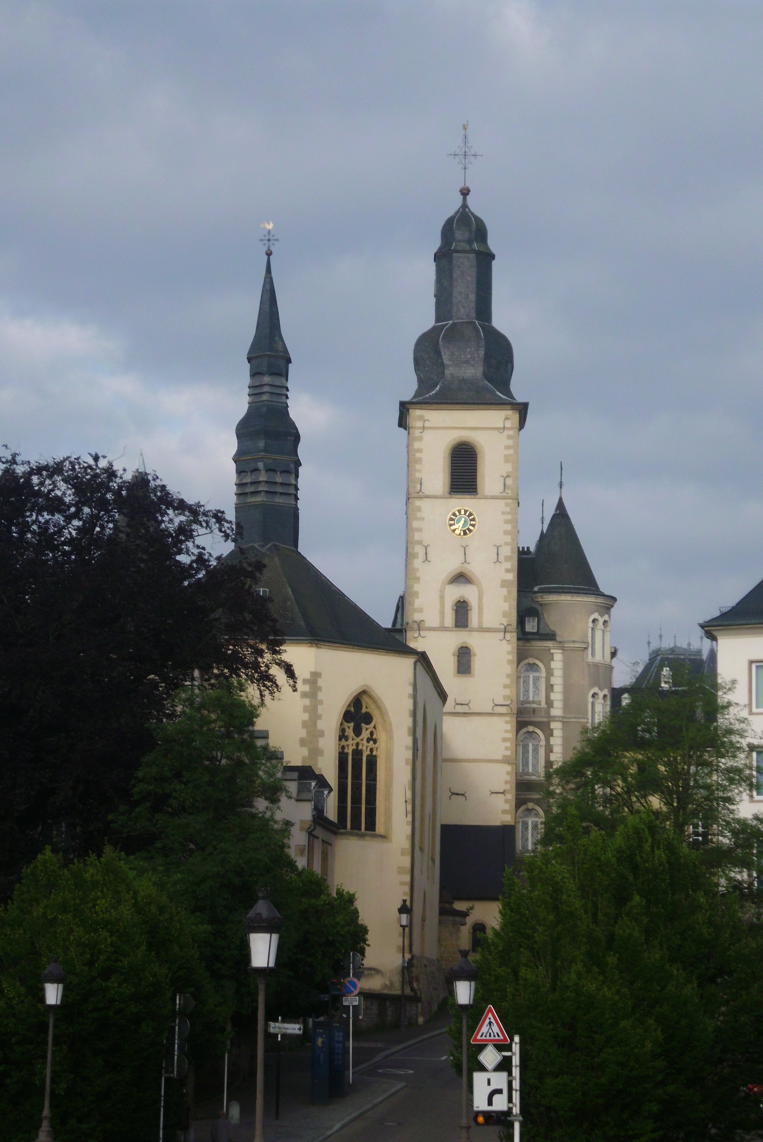 Luksemburg 2013